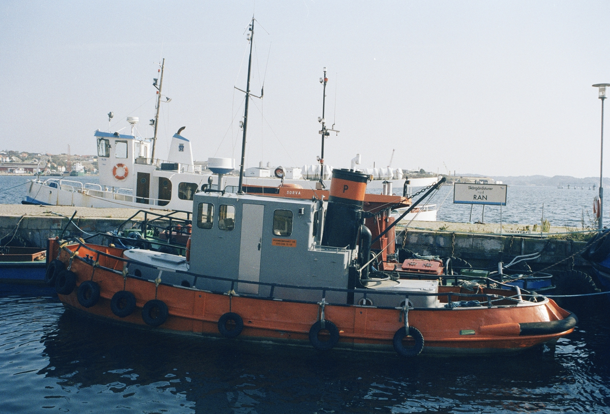 Ship (1909) built in Moss shipyard.